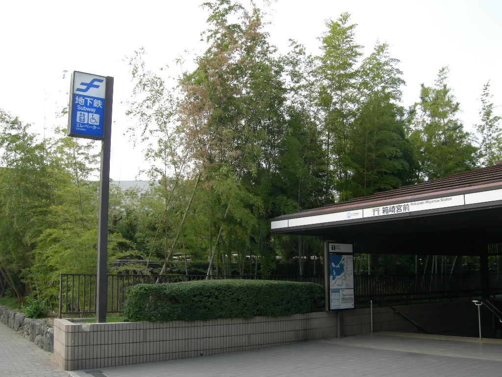 福岡市地下鉄・箱崎宮前駅入口（2006年10月自身撮影）